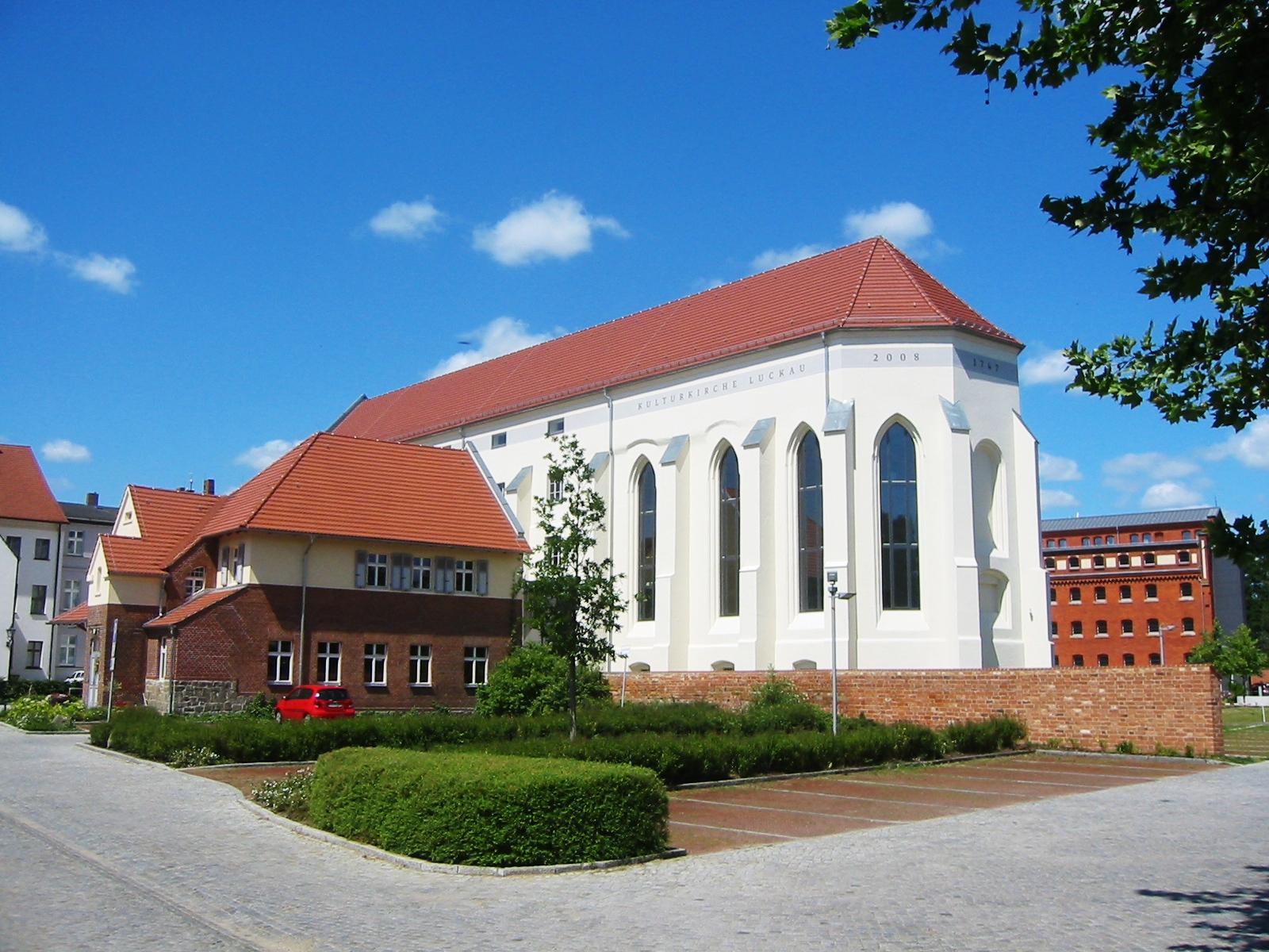 Kulturkirche in Luckau, einer Stadt im Landkreis Dahme-Spreewald in Brandenburg